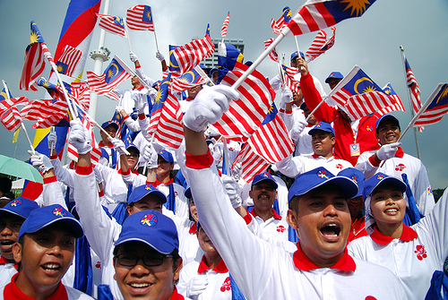 Hari Kemerdekaan Ke 51 Malaysia 08